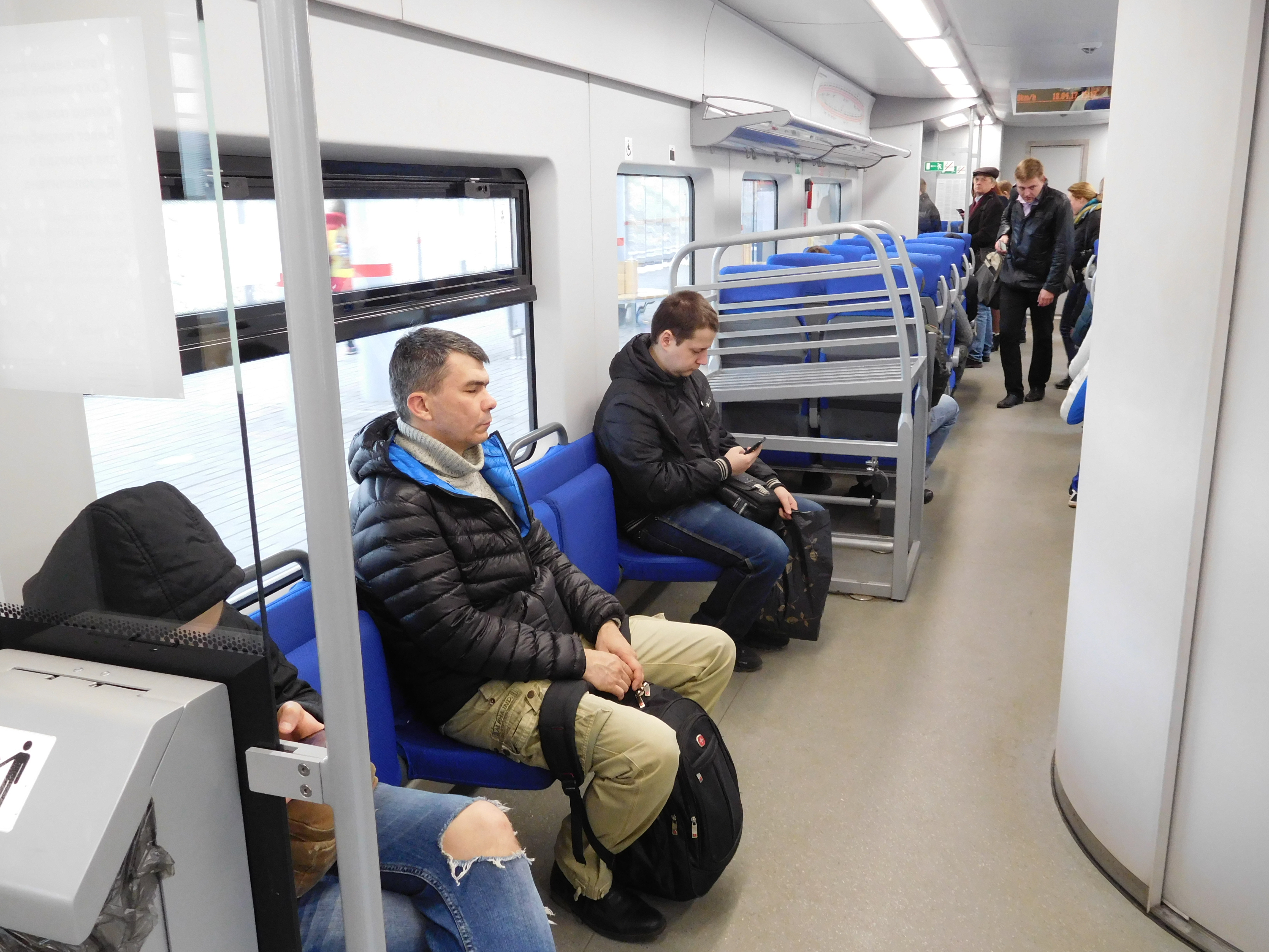 Боковые откидные сиденья в электропоезде ЭС2Г на МЦК